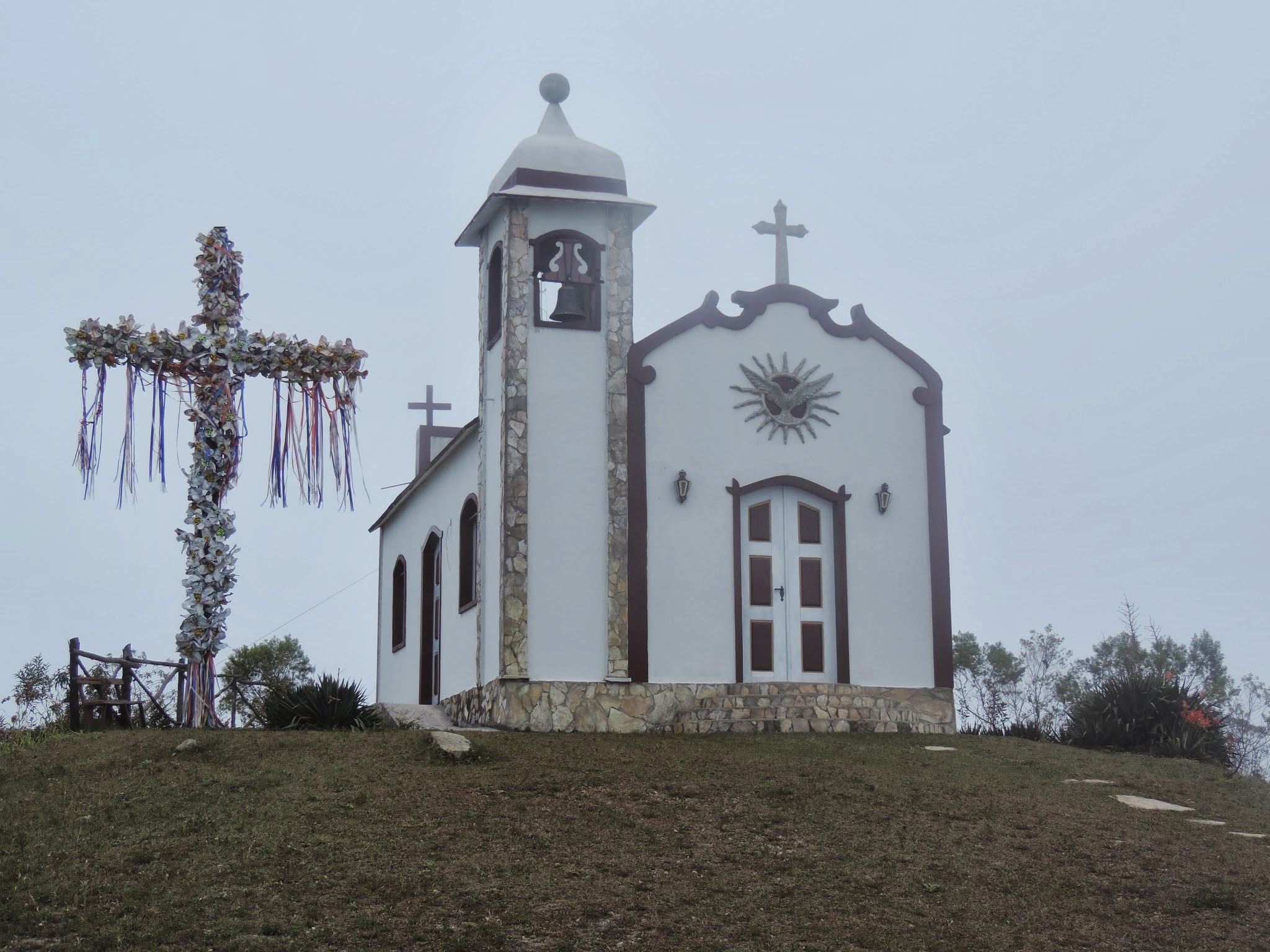 Expedição Serra dos Alves - Agosto 2013